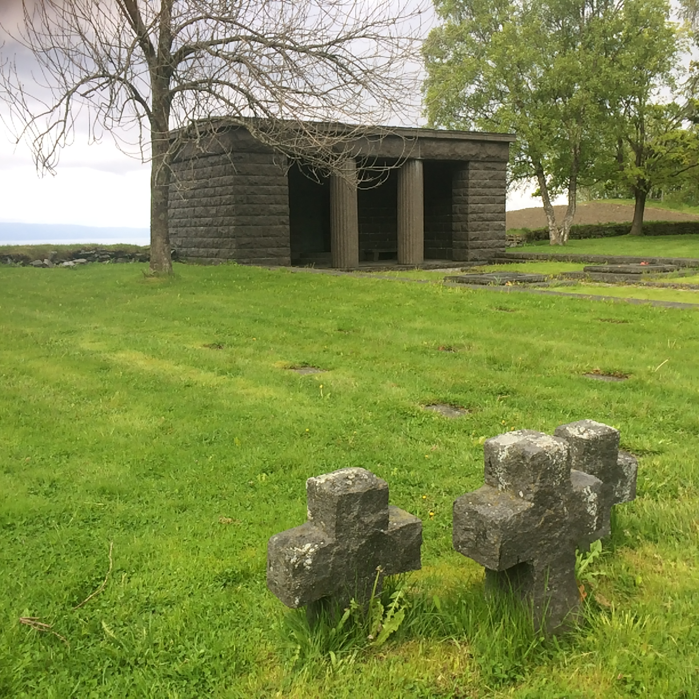 Havstein krigskirkegård i Trondheim, for tyske soldater som falt i andre verdenskrig